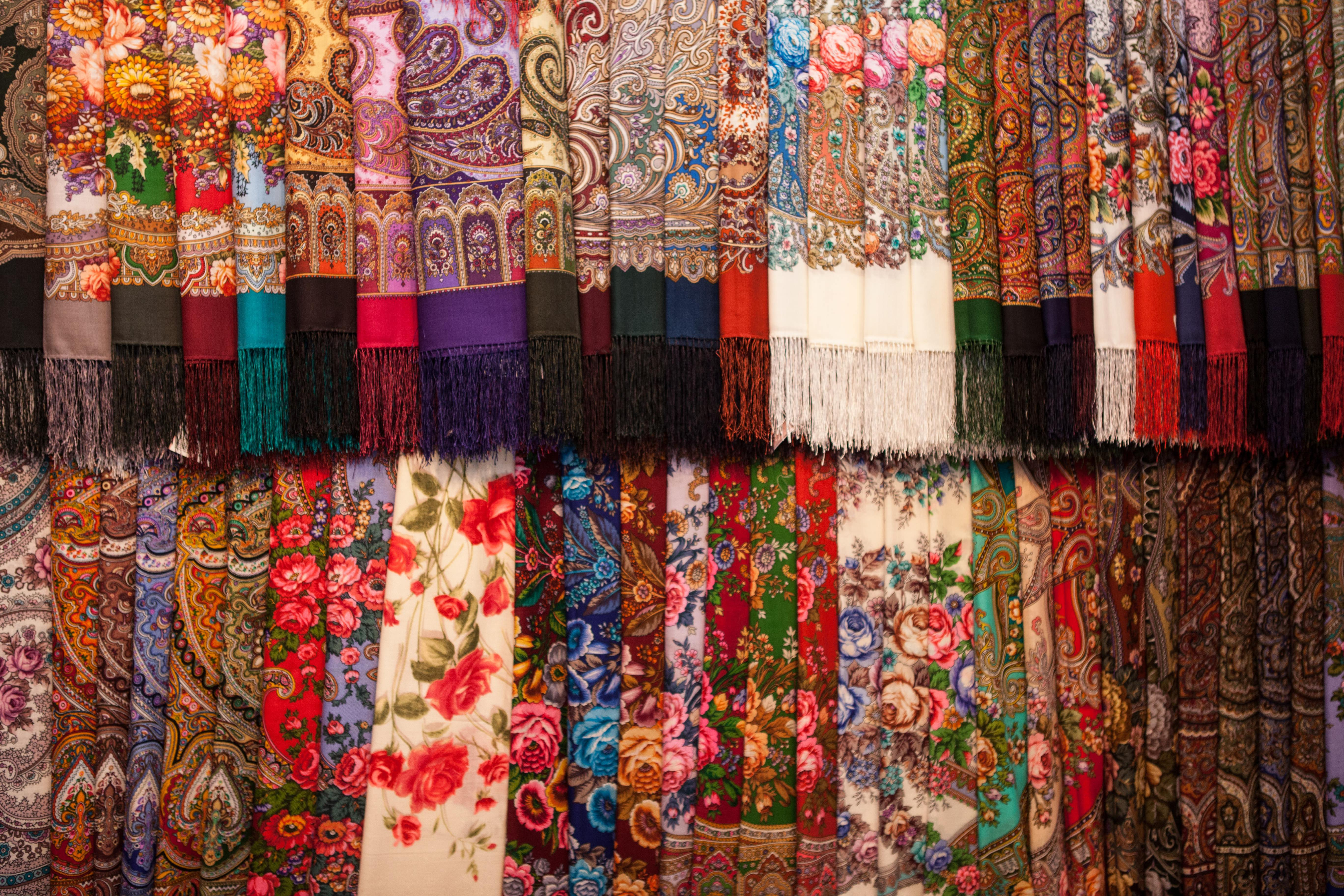 VDNKh (All-Russian Exhibition Center); Выставка достижений народного хозяйства (ВДНХ); Ausstellung der Errungenschaften der Volkswirtschaft (WDNCh)